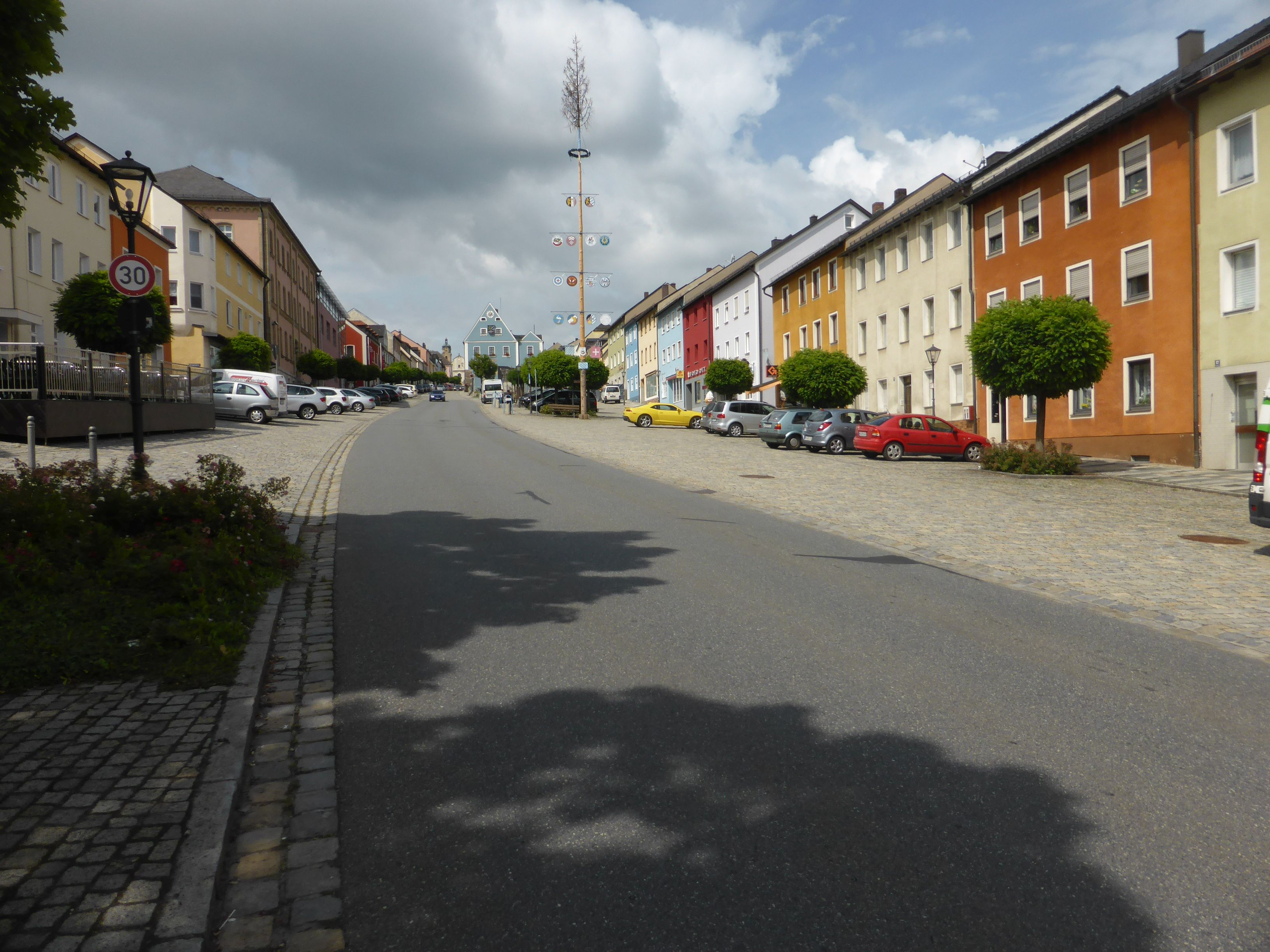 St. Laurentius (Eschenbach in der Oberpfalz)